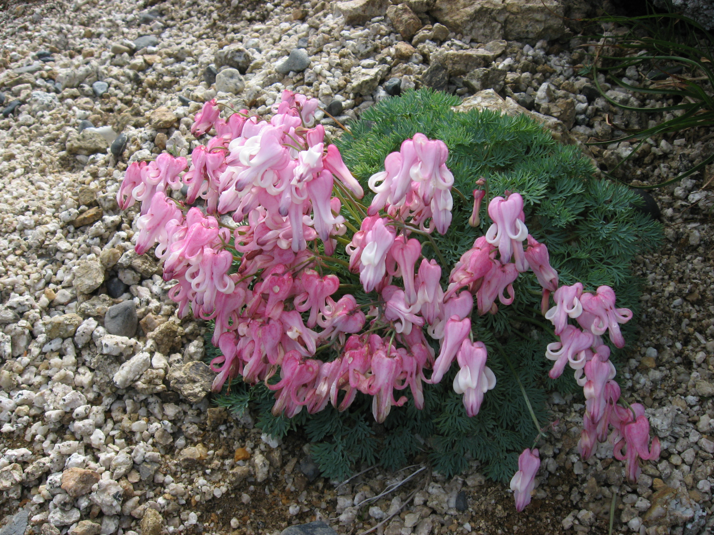 コマクサ (Dicentra peregrina)